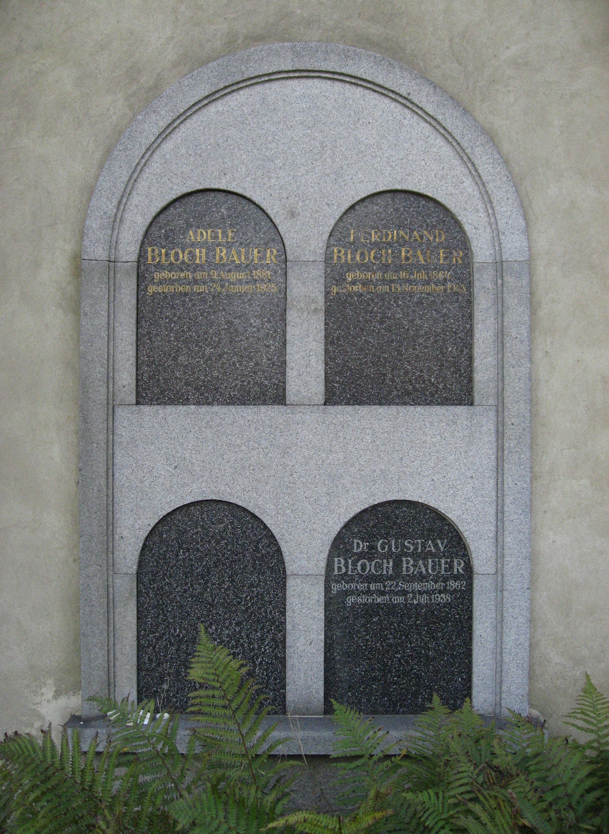 Wien, Feuerhalle Simmering, Urnengrabstelle Bloch-Bauer